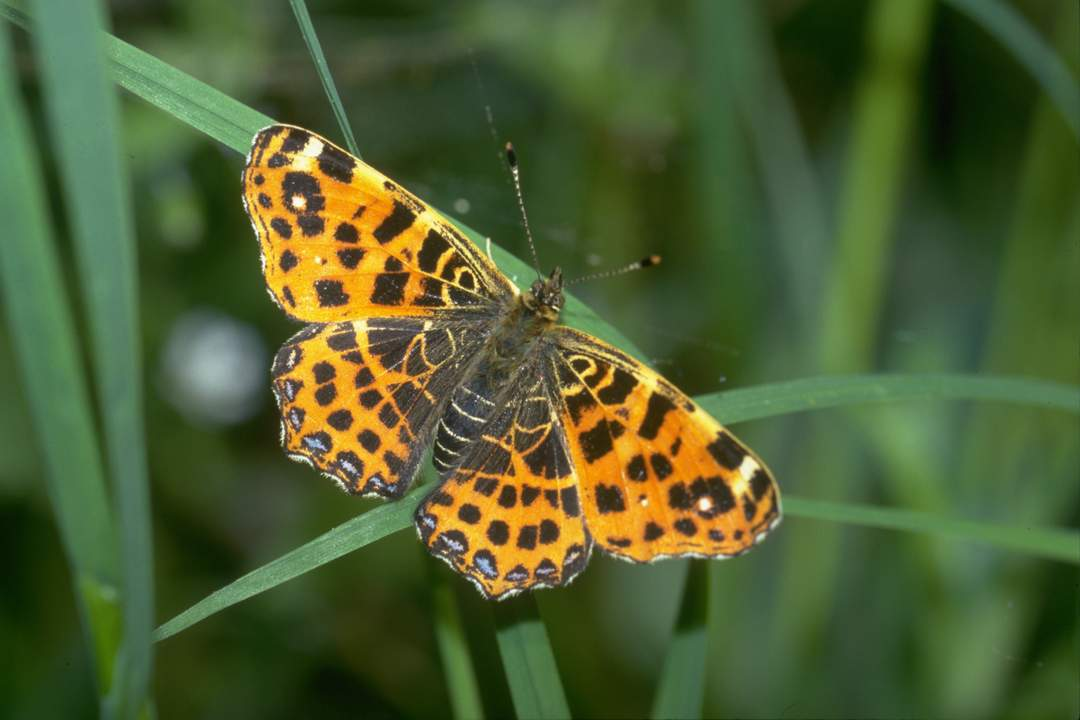 Landkärtchen (Araschnia levana), rote Variante